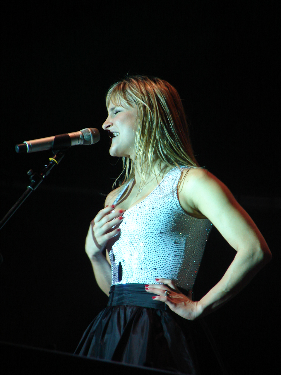 Cláudia Leitte (Cláudia Cristina Leite Inácio Pedreira) na Exposição Agropecuária de Araçatuba